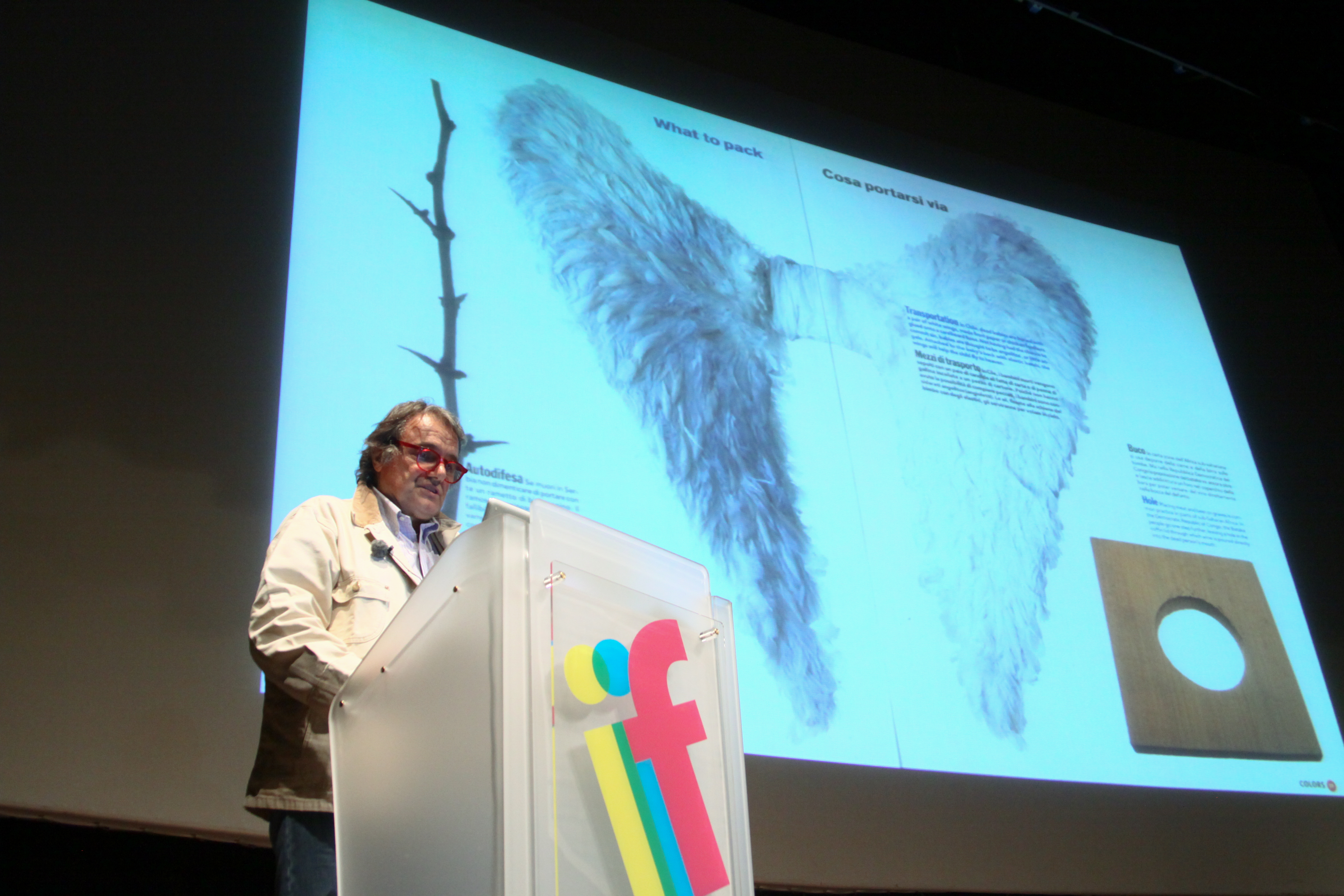 Oliviero Toscani @elisa